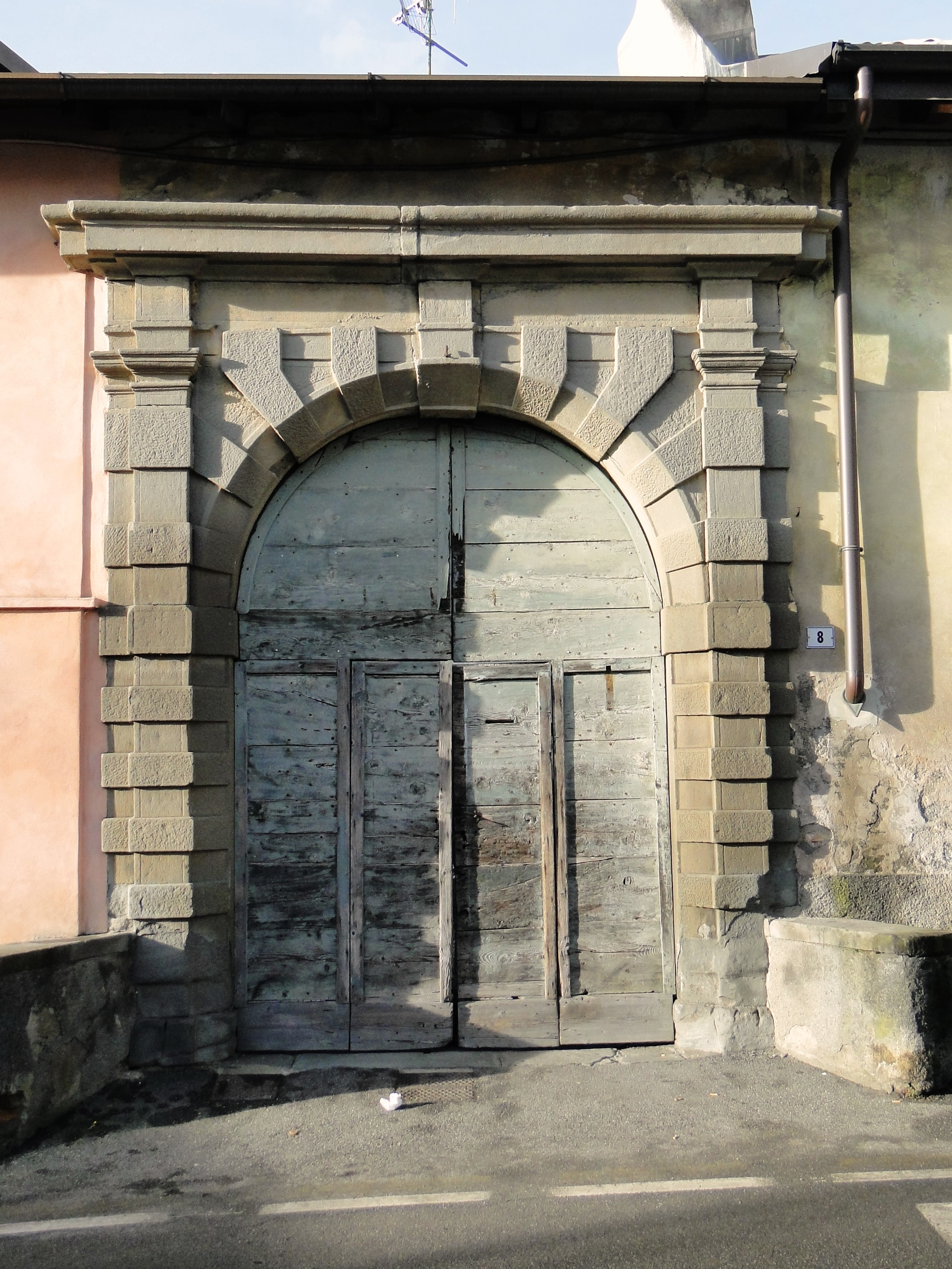 Ex abitazione famiglia Agogeri (XVIII sec.). Cazzano Sant'Andrea (BG). Italy